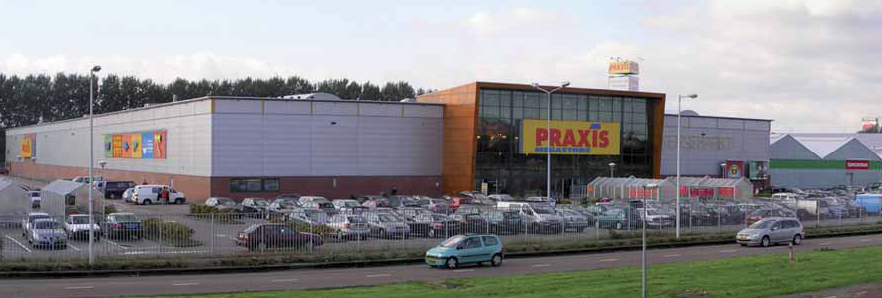 Praxis Amsterdam Zuid-Oost.